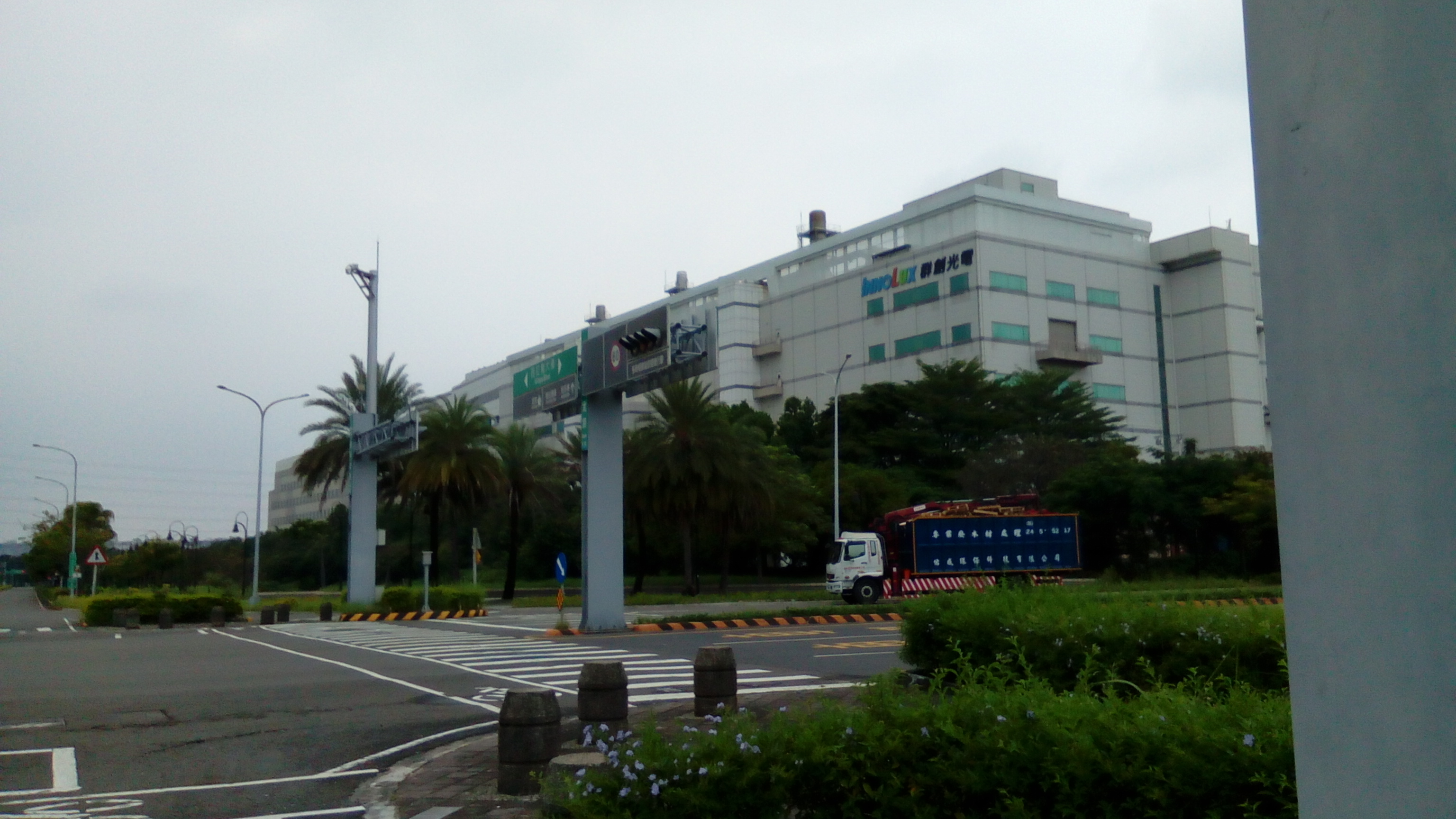 台南科學園區